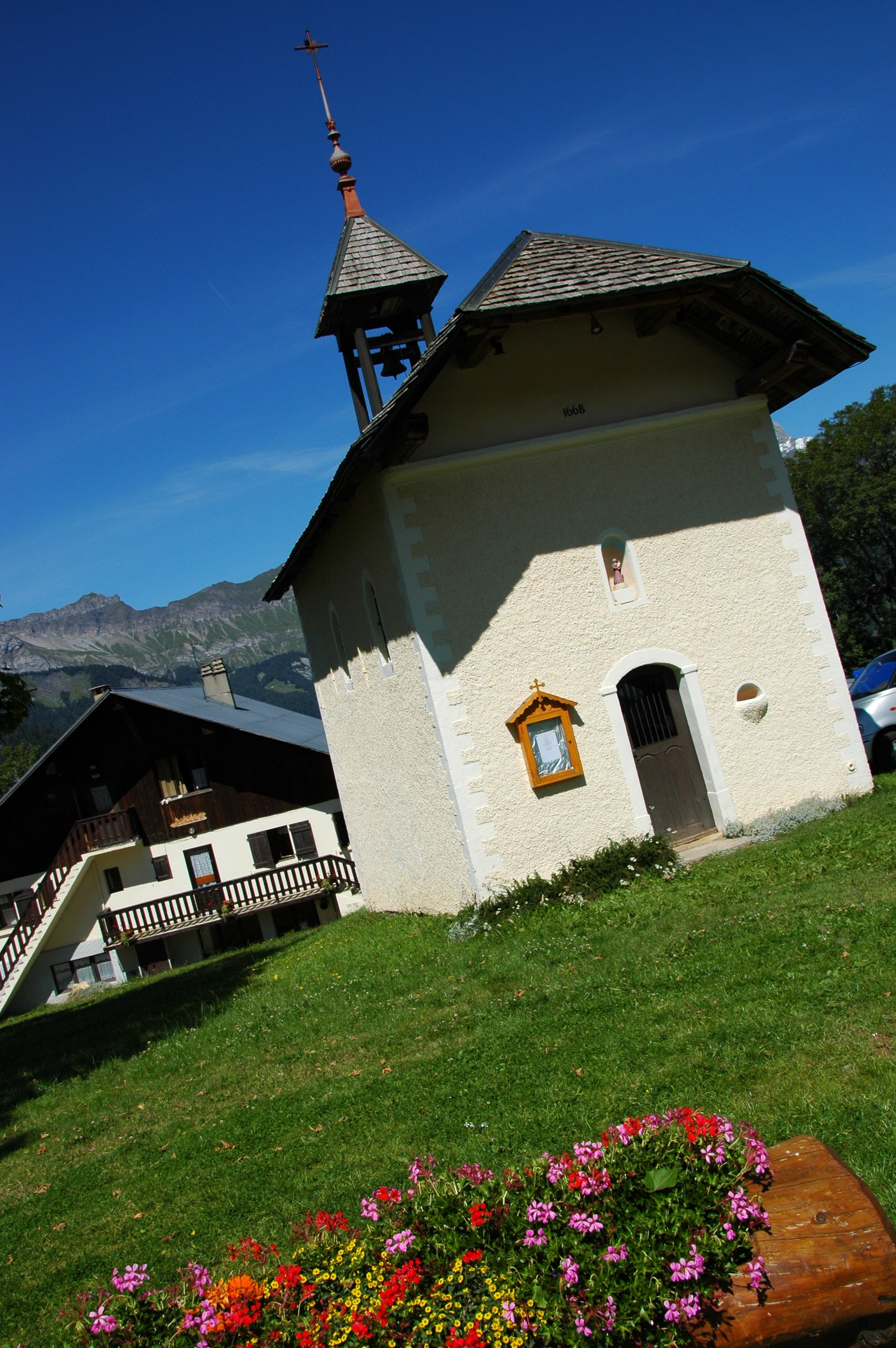 La chapelle du Cernix, hameau principal de Cohennoz.